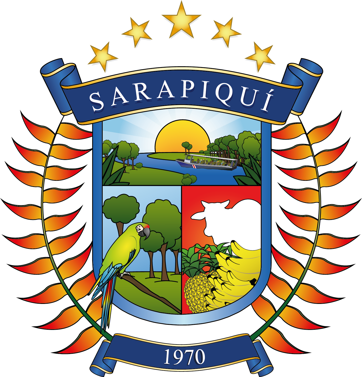 Escudo del Cantón de Sarapiquí